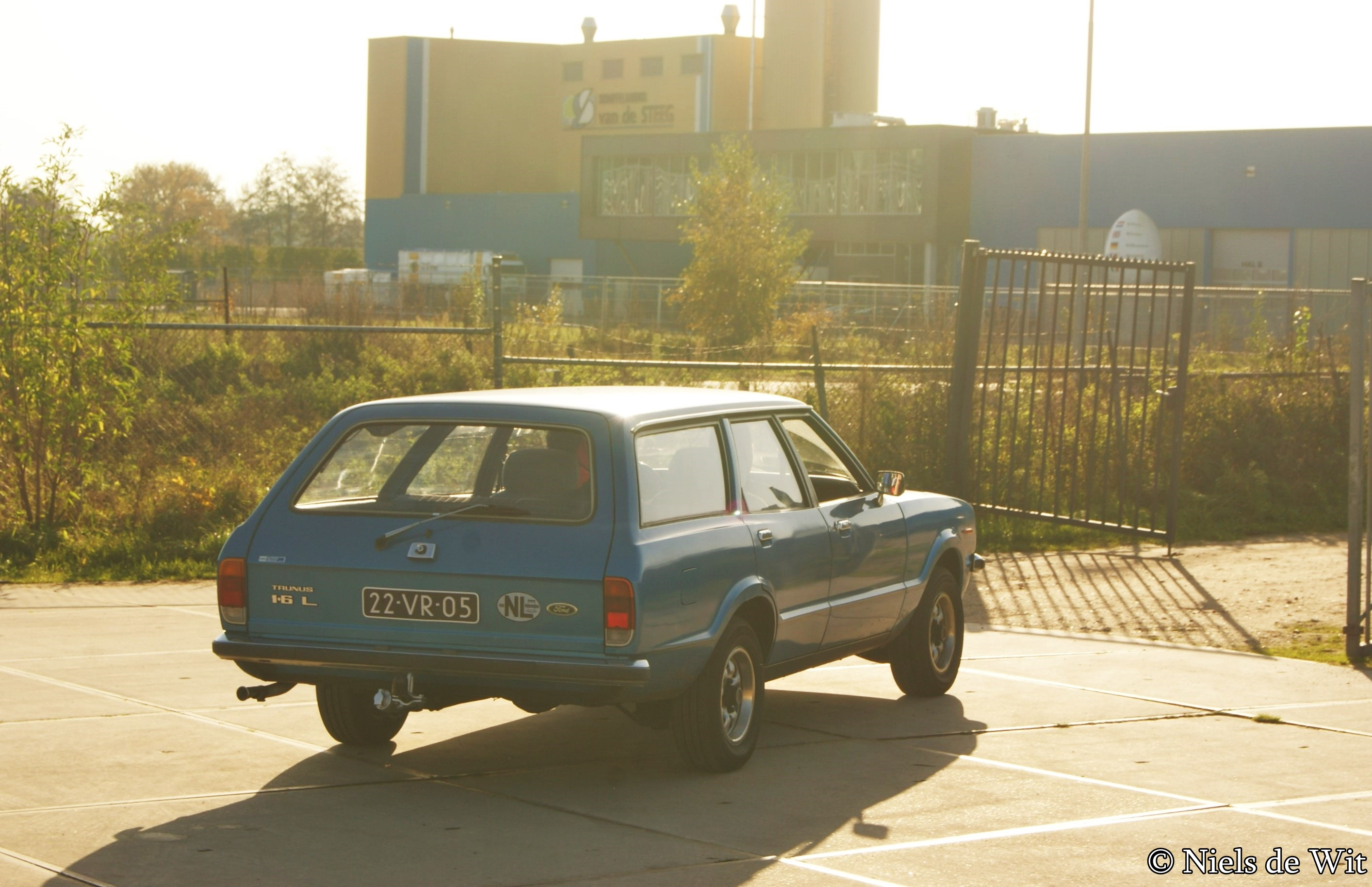 22-VR-05 Ford Onderdelendag, Barneveld